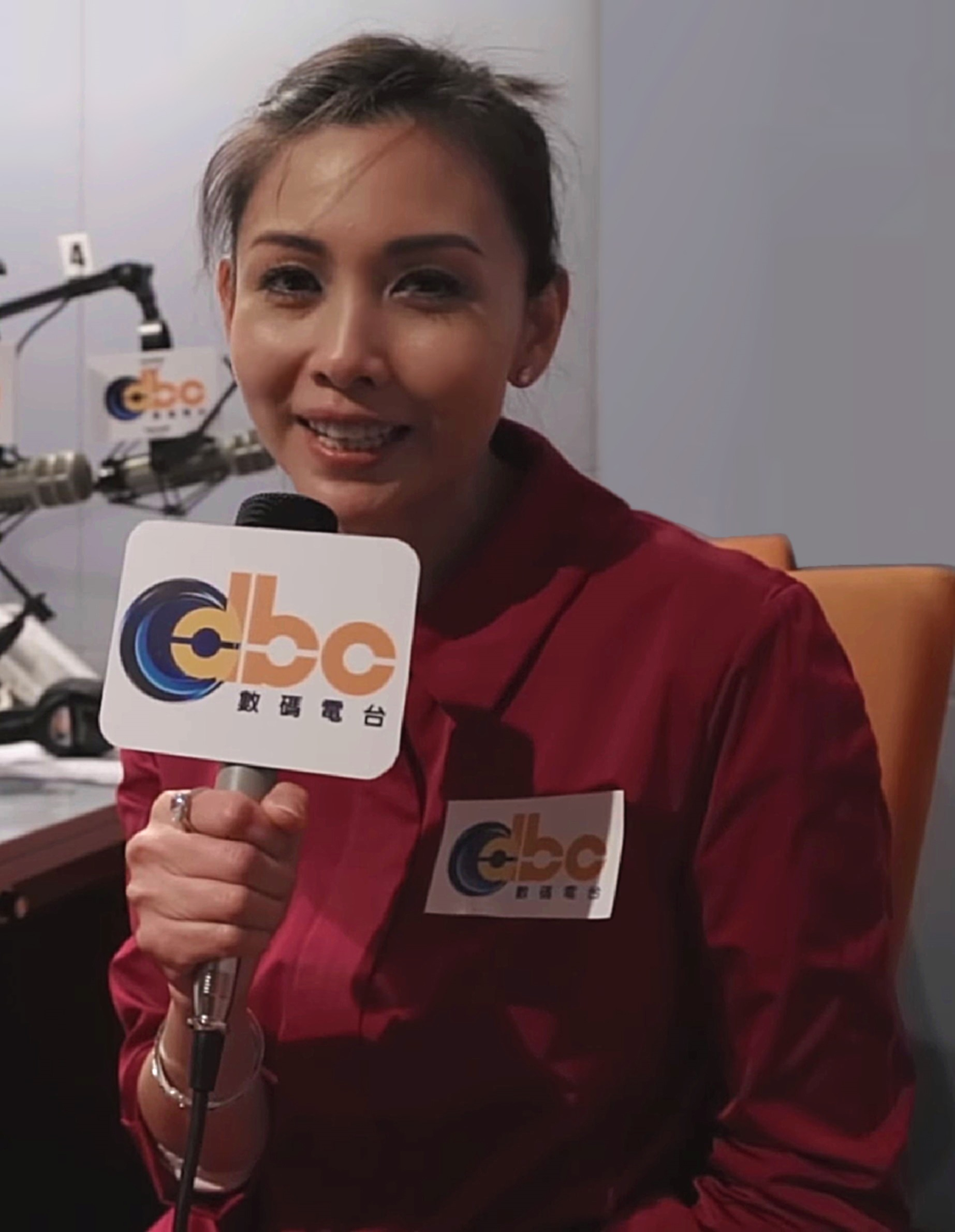 中文（香港）: 前香港女藝人，1999年下嫁時裝公司「I.T」創辦人沈嘉偉，同時選擇息影。因婚後令丈夫生意不斷擴充，因而獲媒體封為「香港首席旺夫女星」